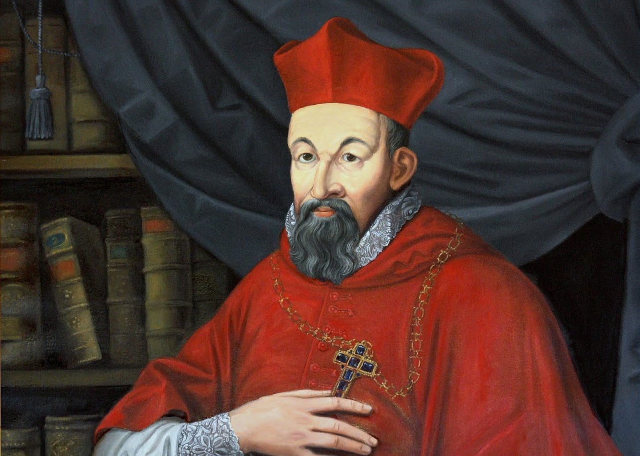 Pázmány Péter, festmény részlete, Bp ELTE Jogi kar